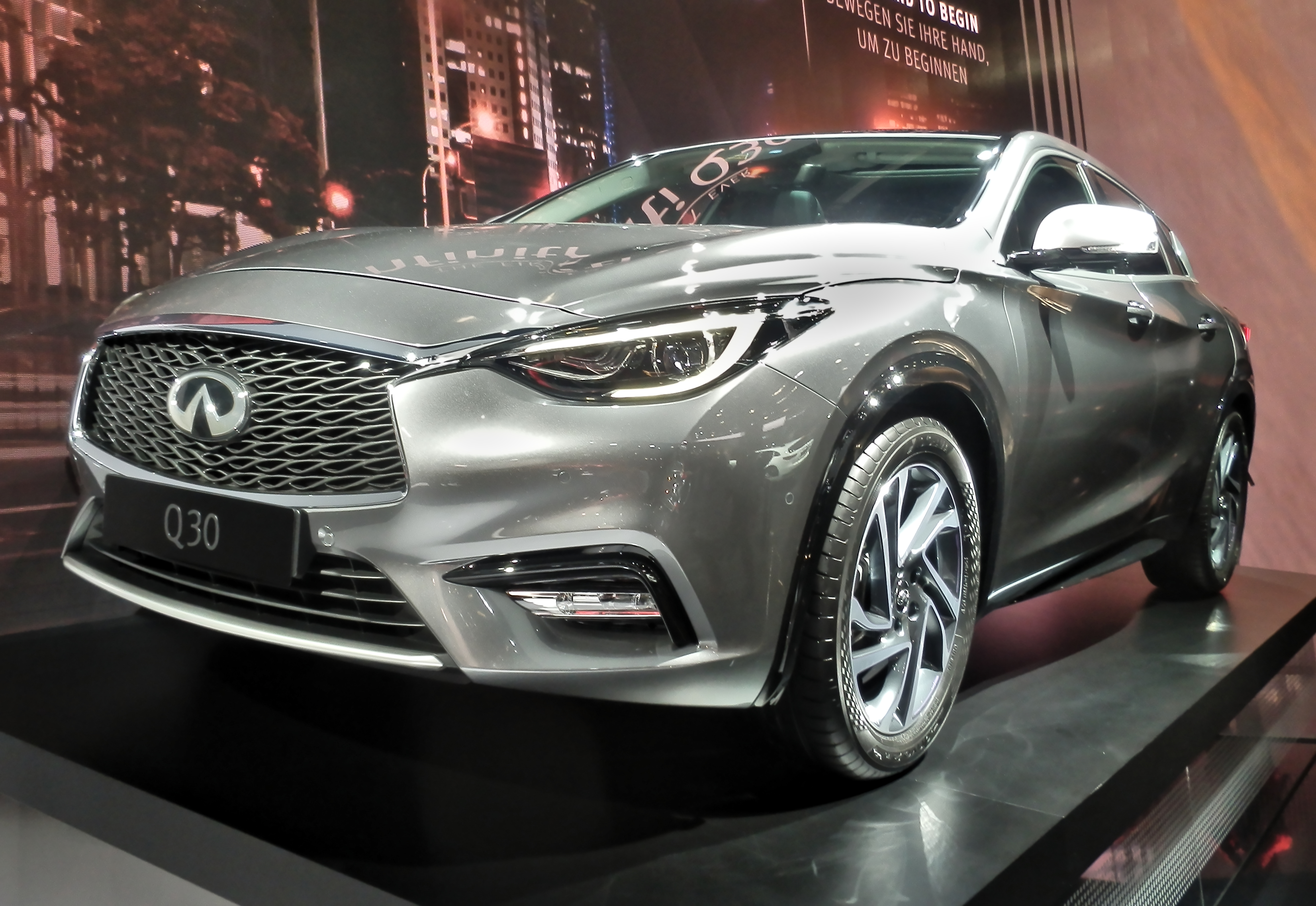 Infiniti Q30 IAA2015